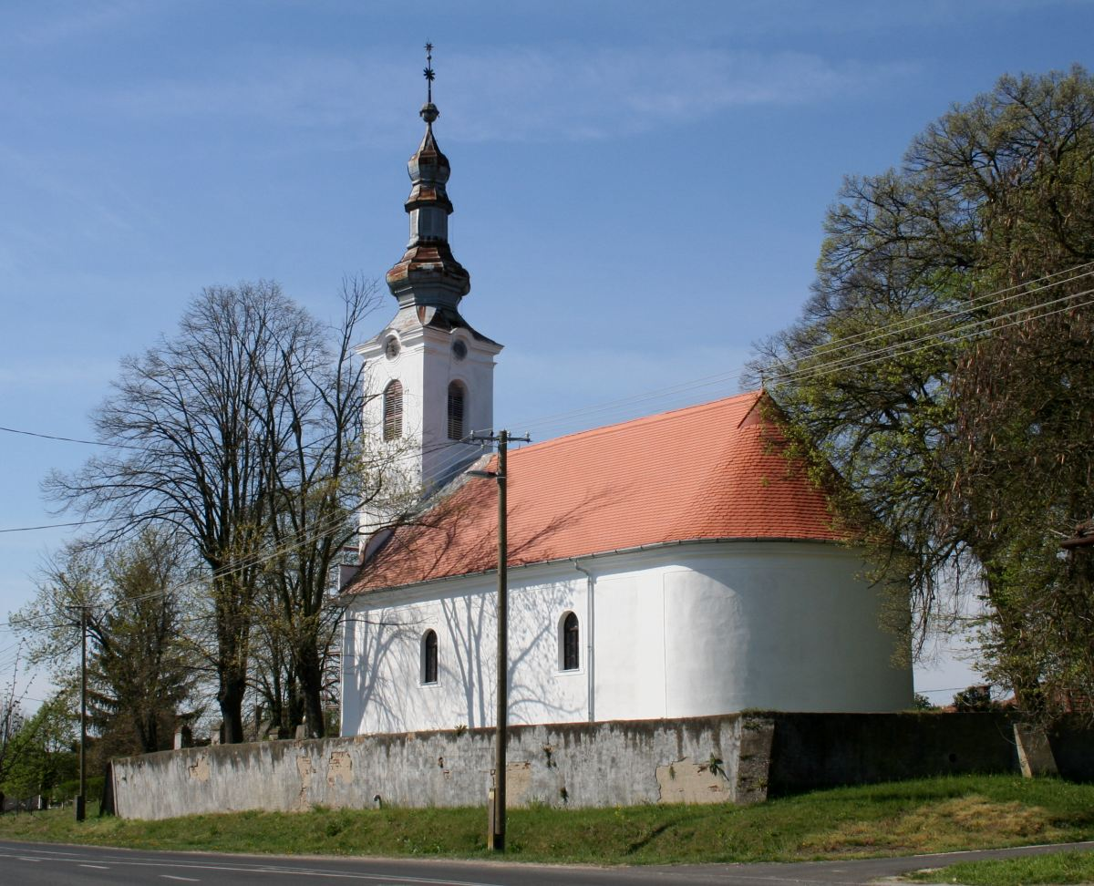 Gige, református templom